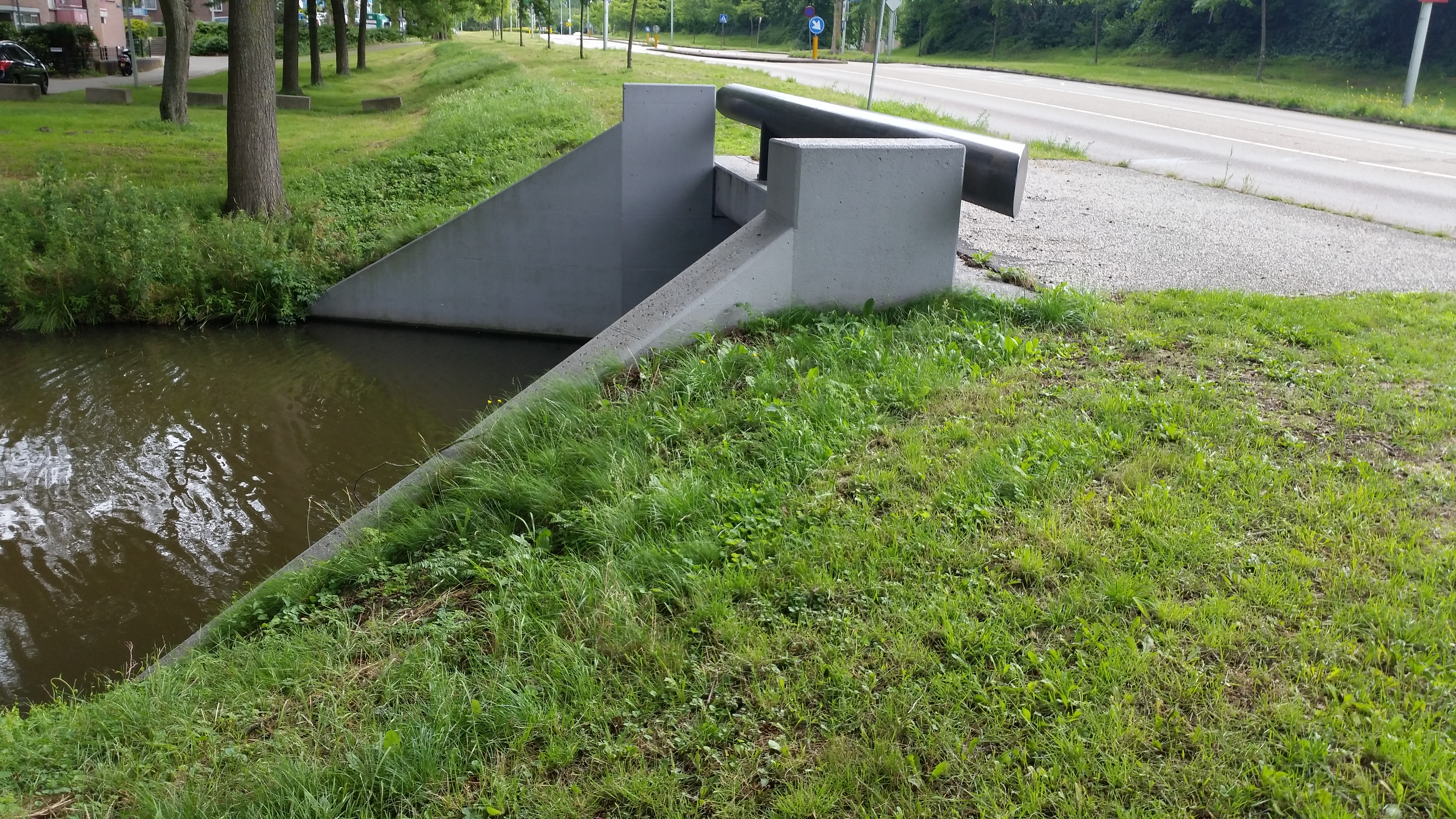 Impressie van brug 1344 in de Schoonhovendreef, Amsterdam Zuidoost